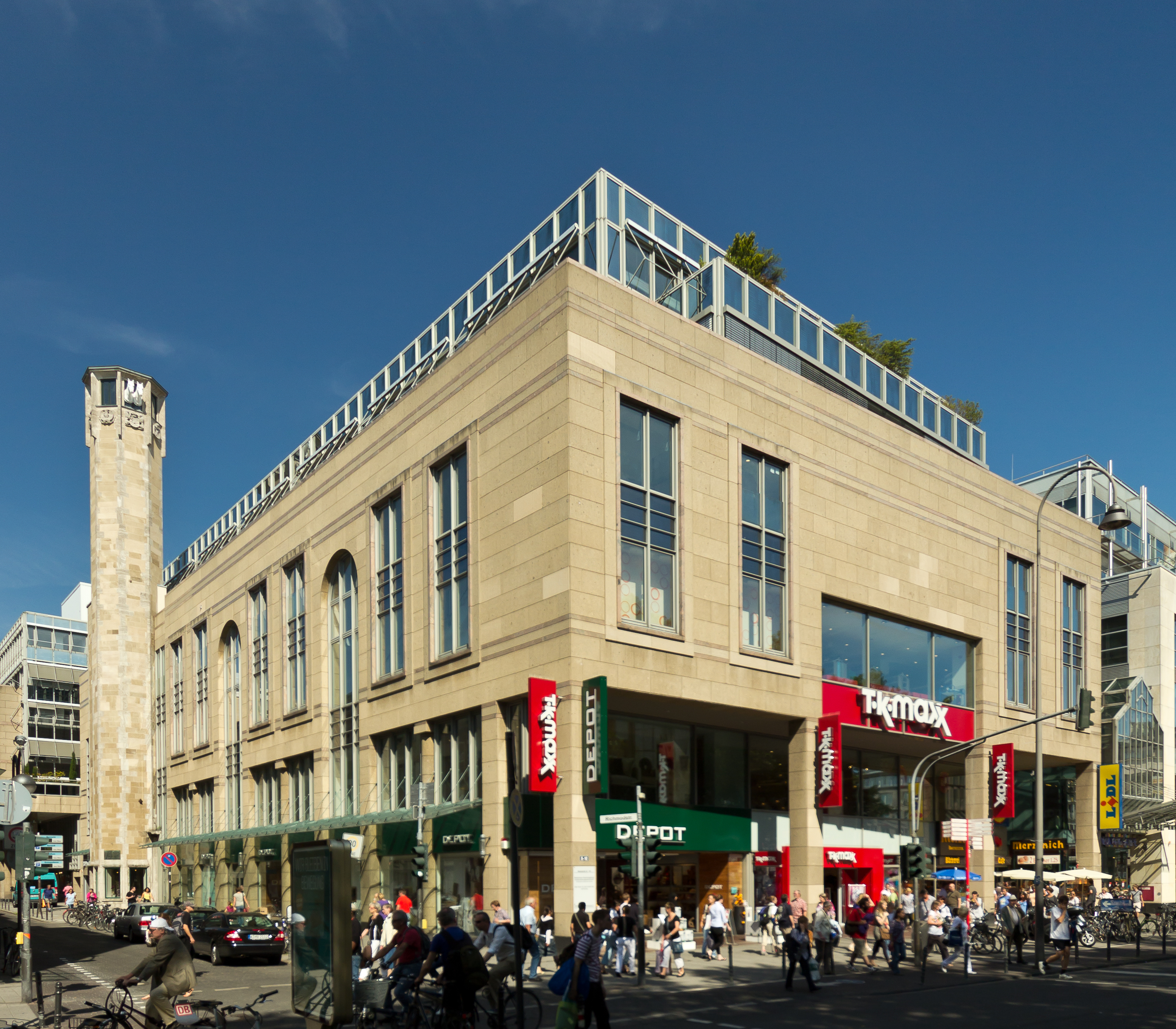 Denkmalgeschützter Turm des Richmodishauses und Fassadenreste, Neumarkt 8-10, Köln